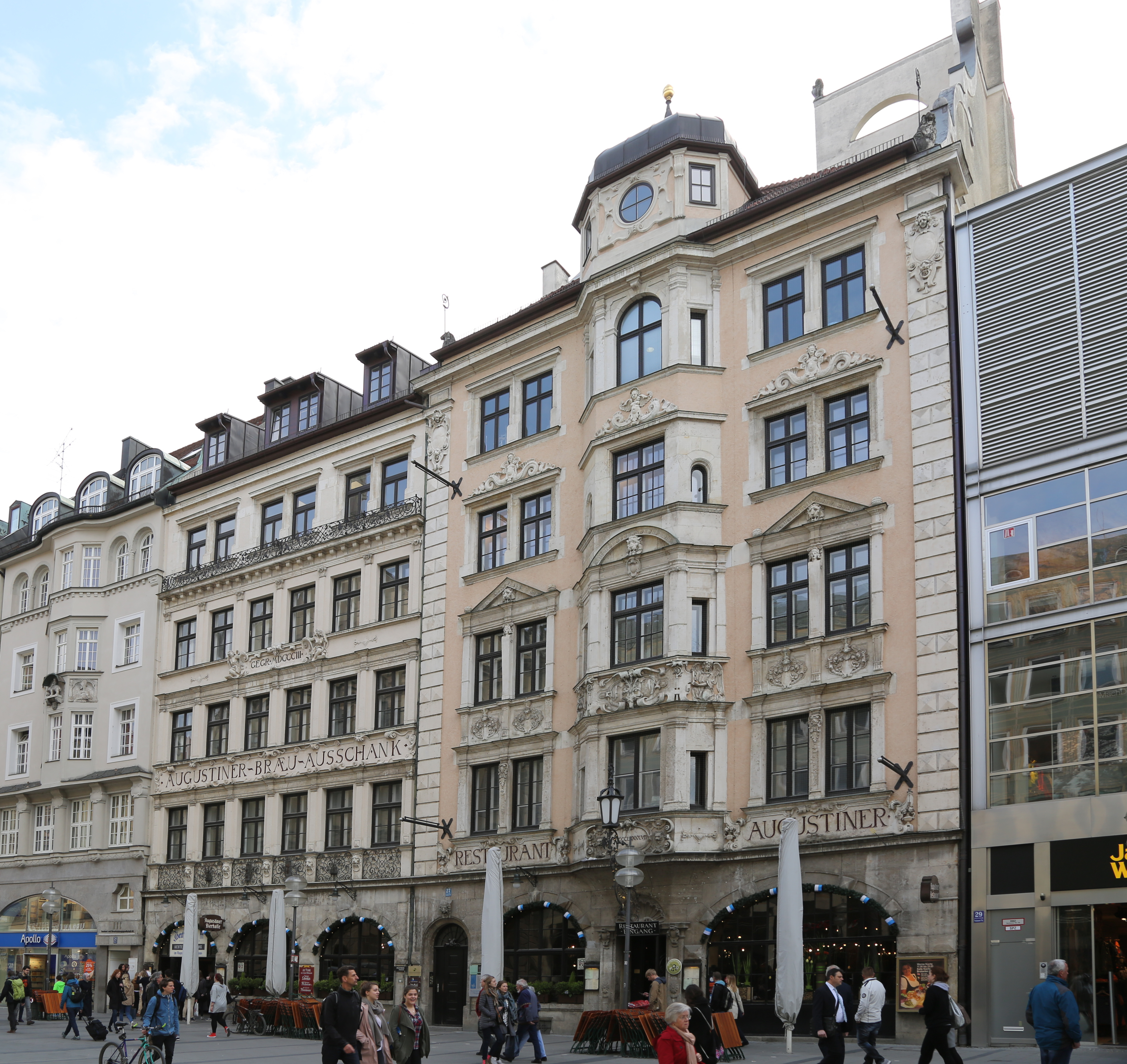 Augustiner-Stammhaus in der Münchner Neuhauser Straße.